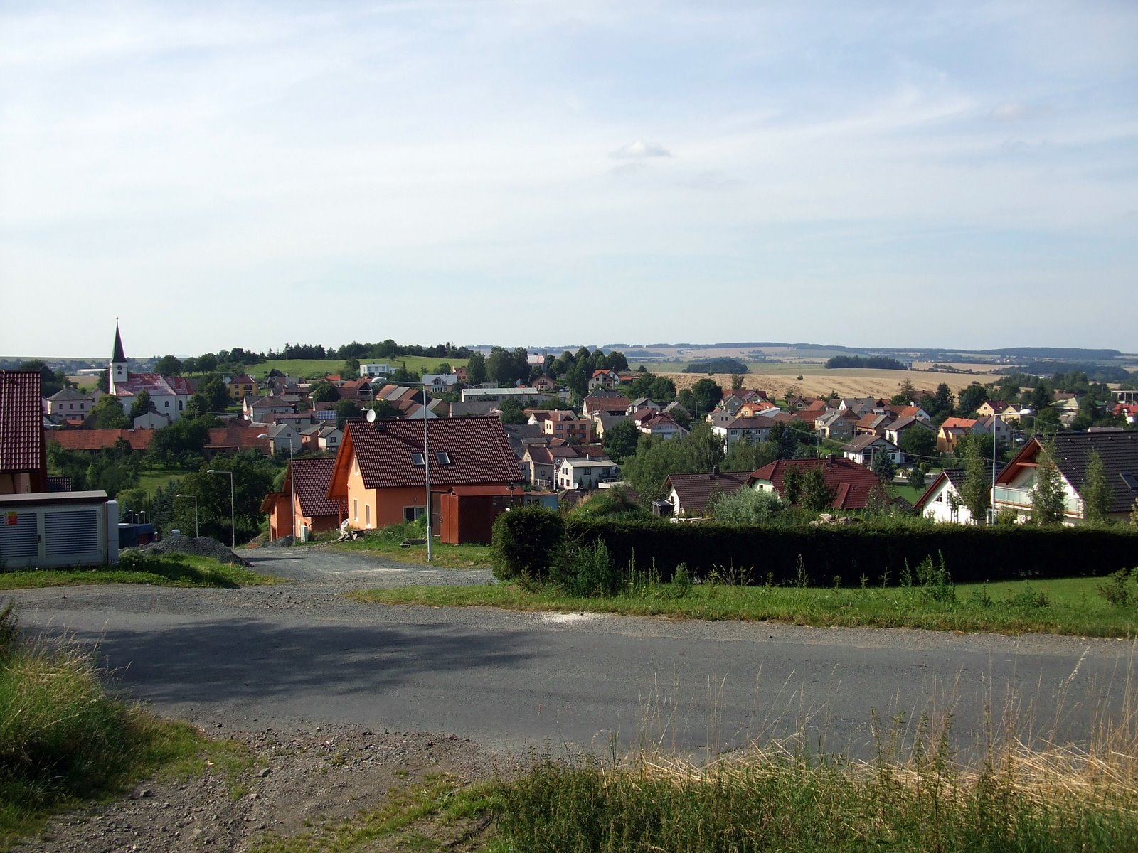 Česky: Mrákovské panorama